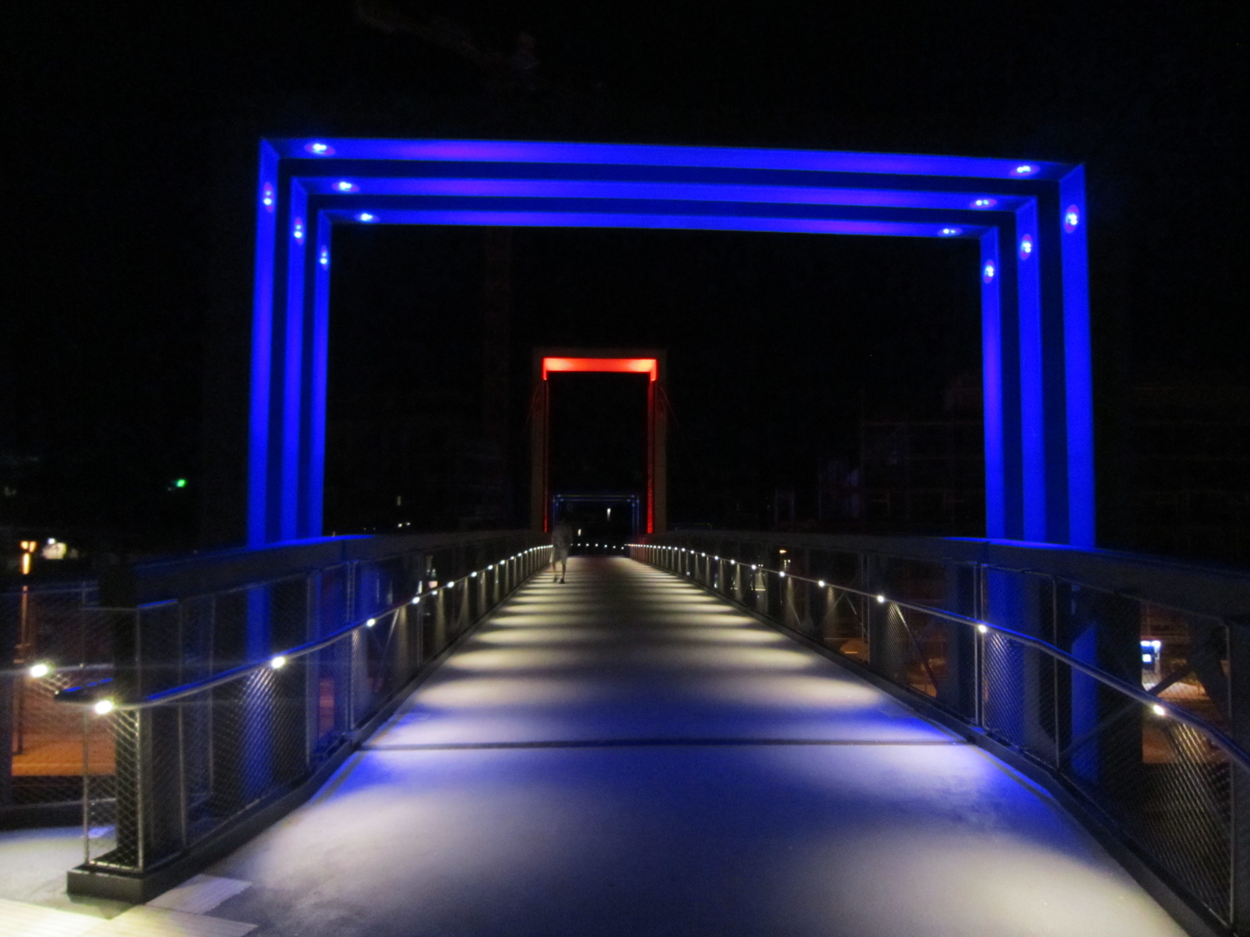 Illuminierte Fußgängerbrücke über die Bahnline Delmenhorst - Hesepe in Vechta